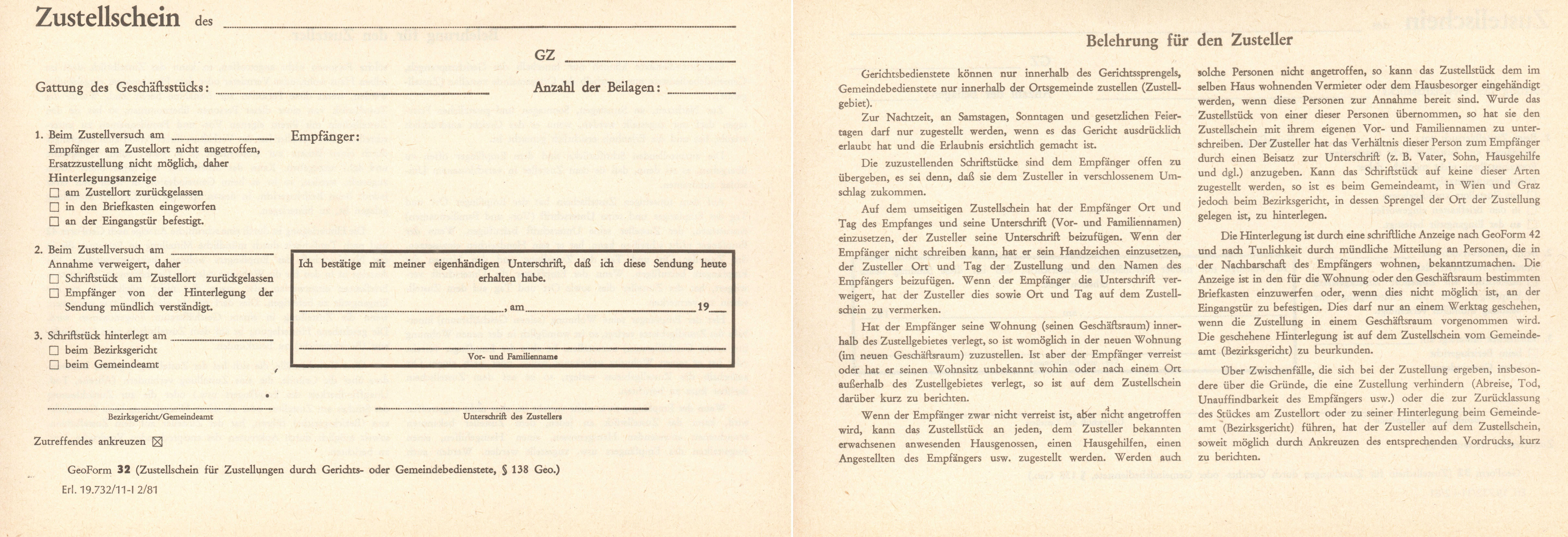 Historischer Zustellschein gemäß Zustellgesetz der Republik Österreich